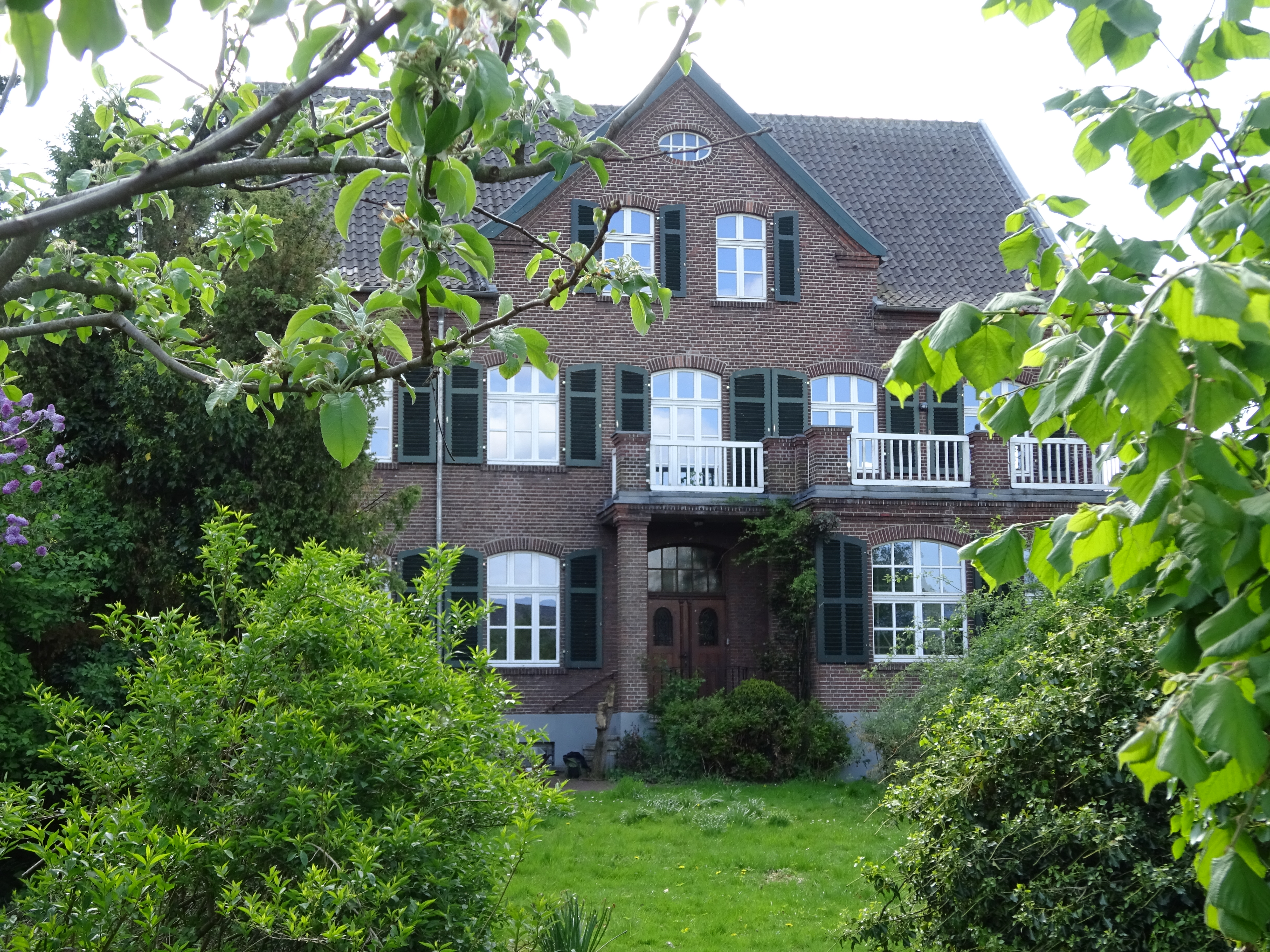 Rees-Bienen, Niederstraße 3, Haus Weegh, Naturschutzzentrum im Kreis Kleve e.V.